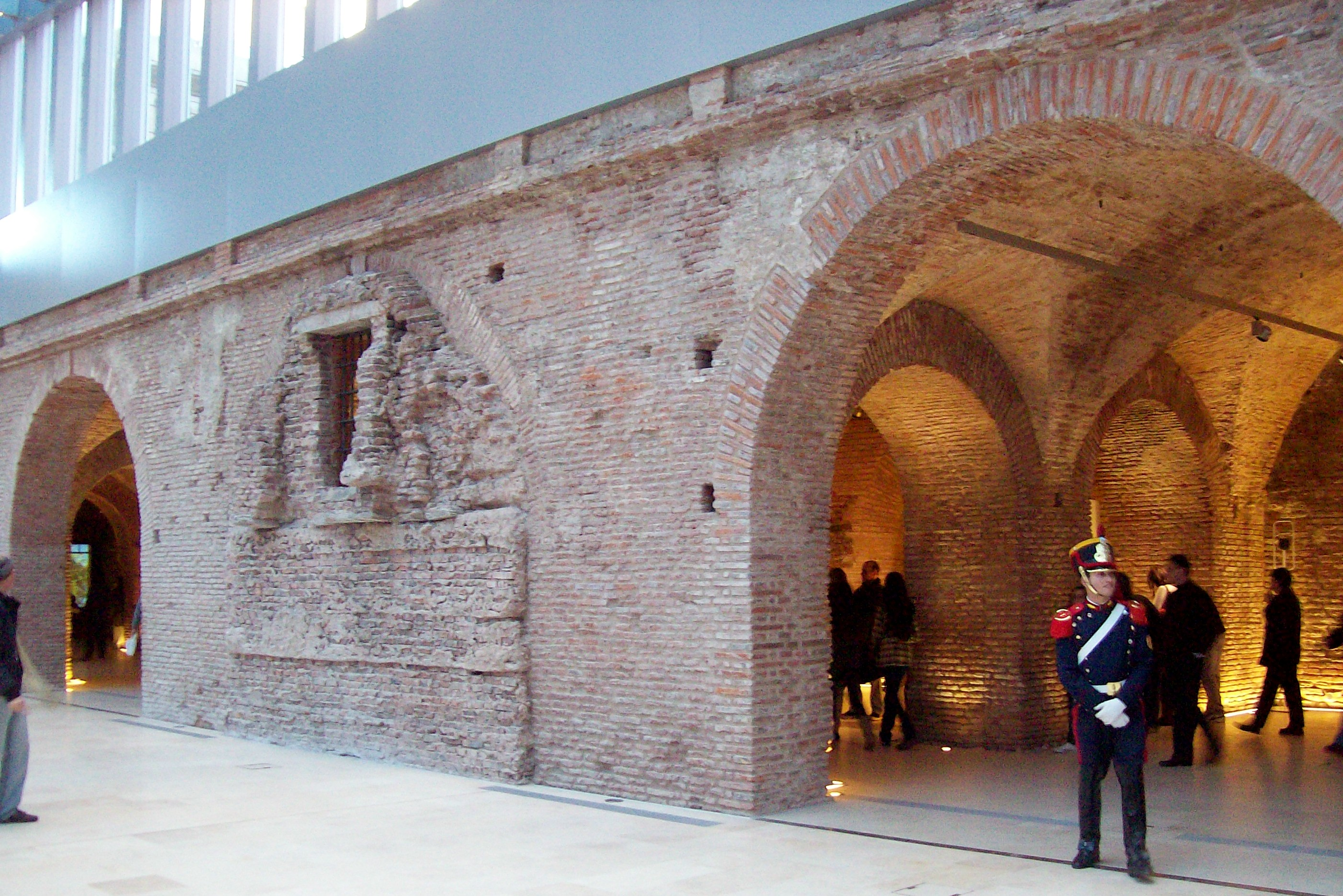 Granadero en el Museo del Bicentenario, en la Casa Rosada, Buenos Aires, Argentina